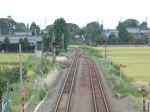 JR新関駅・新津方ポイント